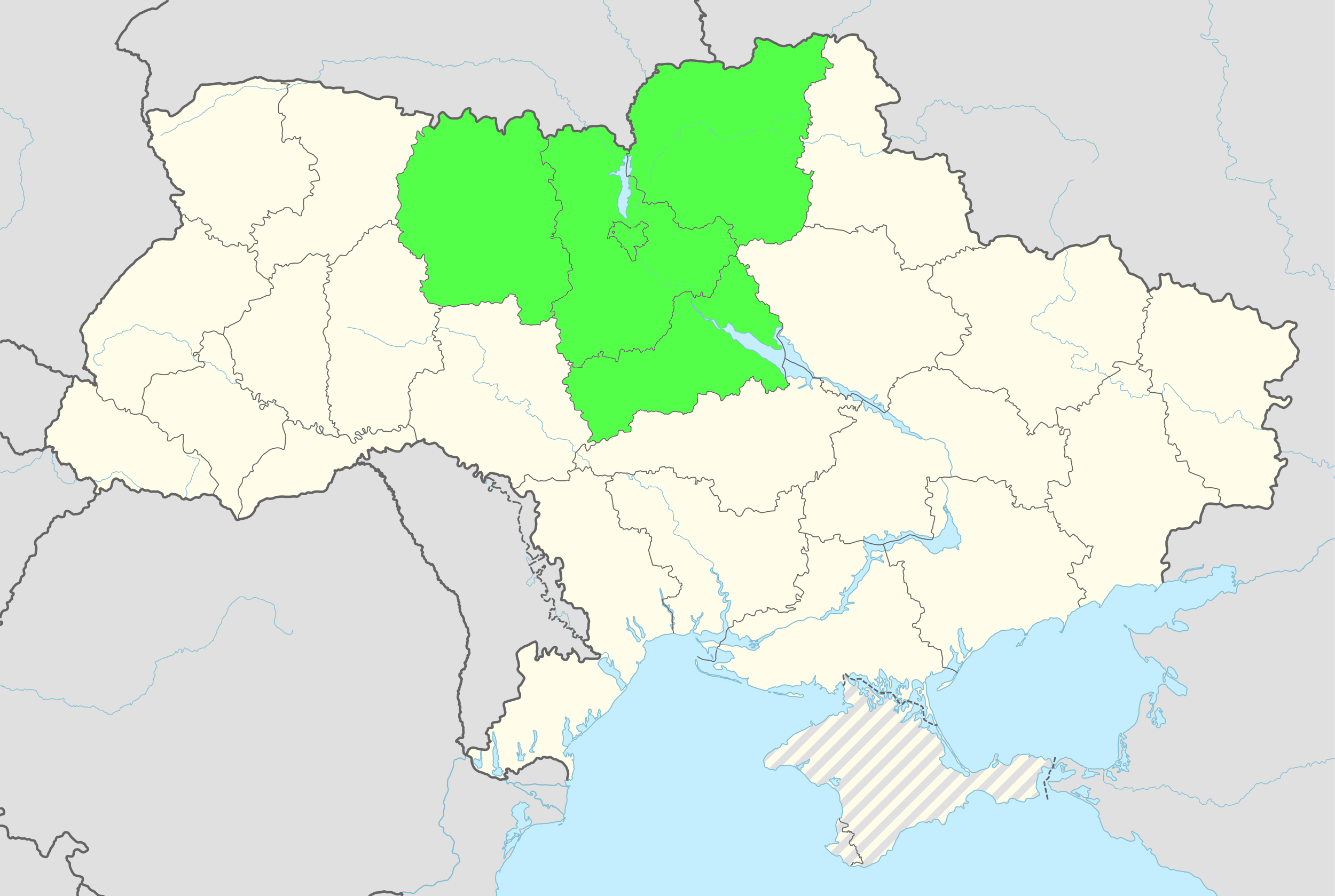 Карта, Національна гвардія України, Північне територіальне управління